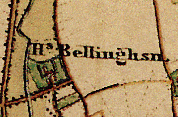 Haus Bellinghoven in Kerken-Nieukerk auf einem Messtischblatt der Preußischen Uraufnahme